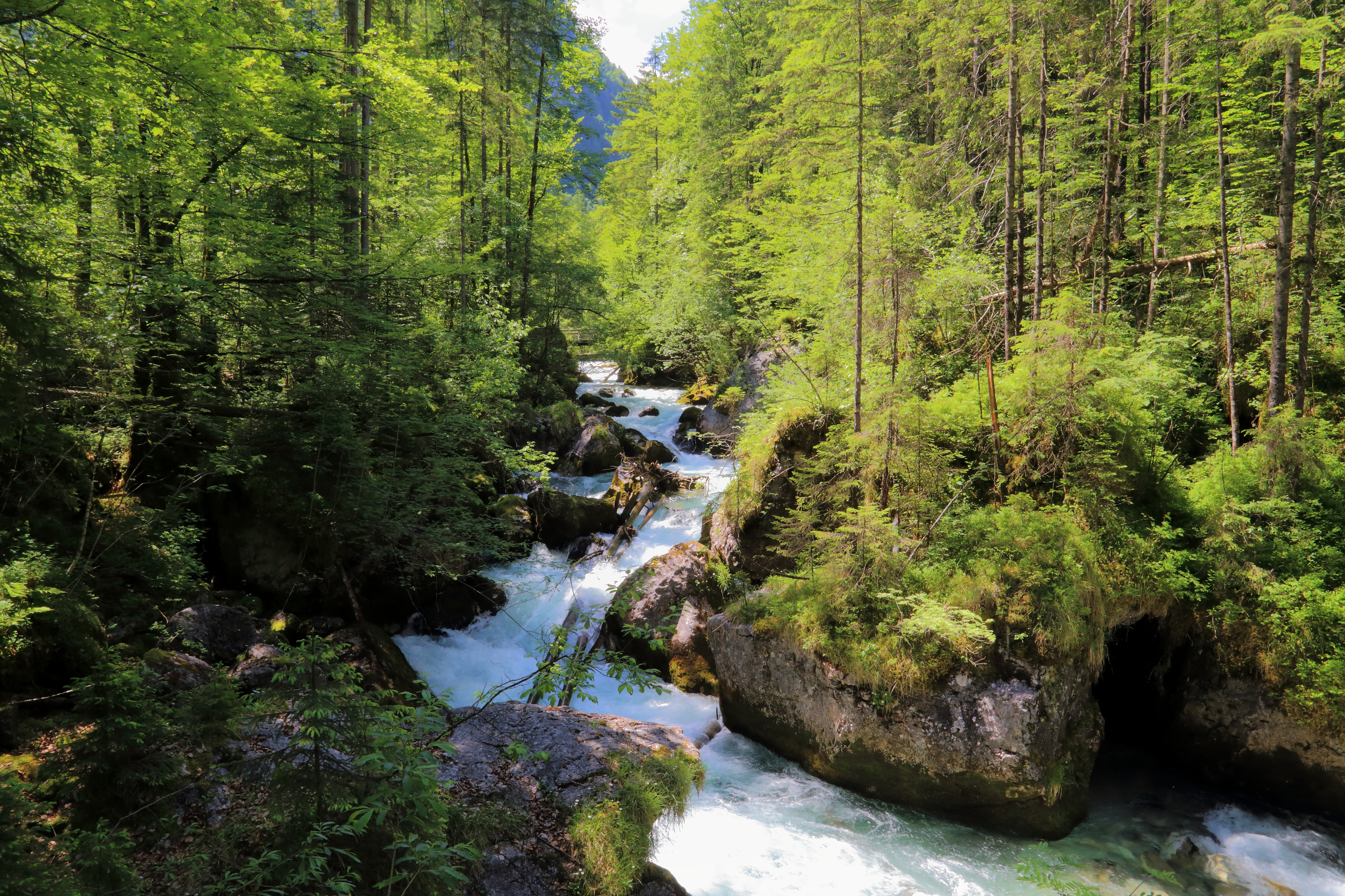 Der wildromantische Waldbach im Echerntal der oberösterreichischen Marktgemeinde Hallstatt.